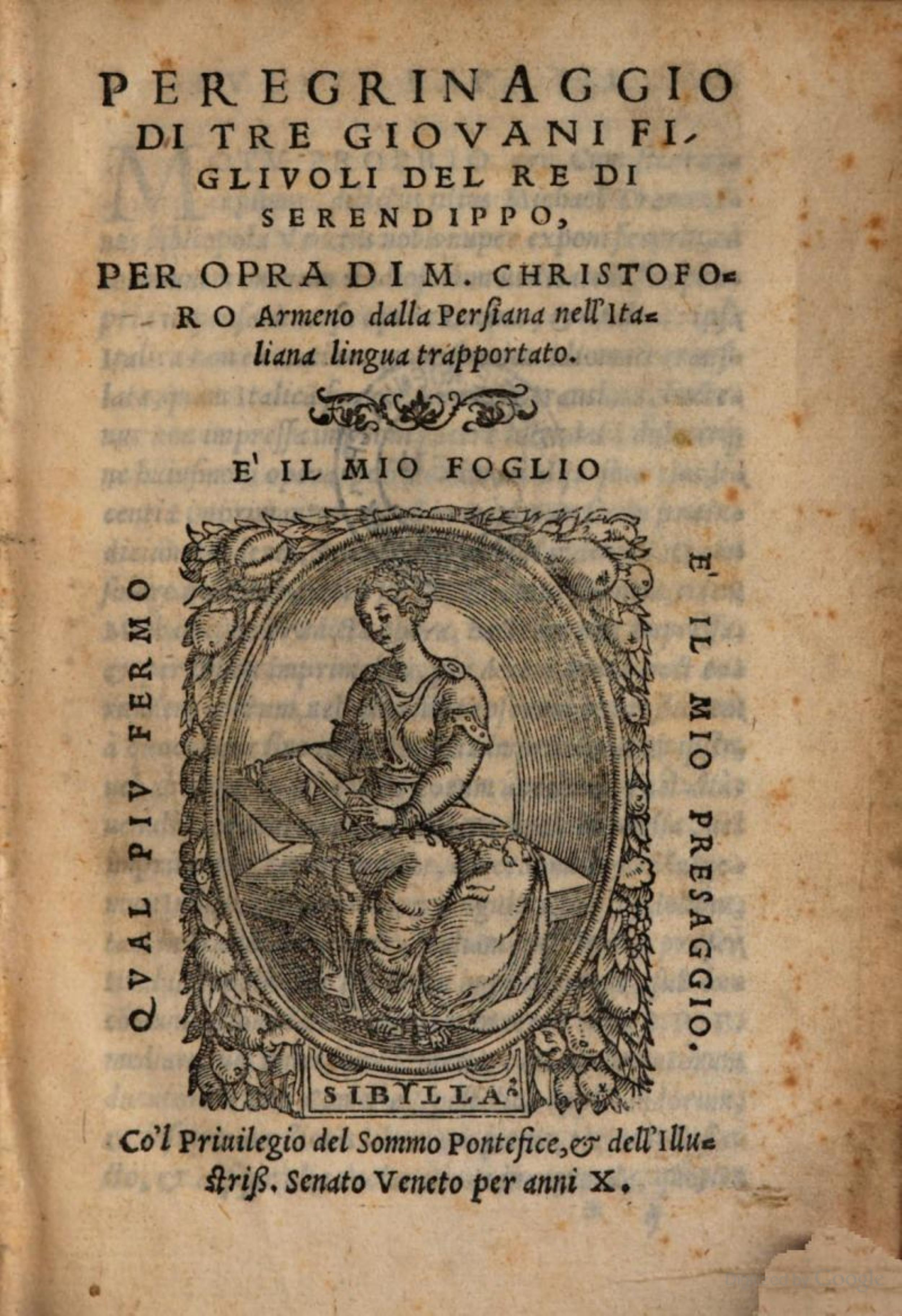 Frontespizio dell'opera di Cristoforo Armeno, Peregrinaggio di tre giovani figliuoli del re di Serendippo